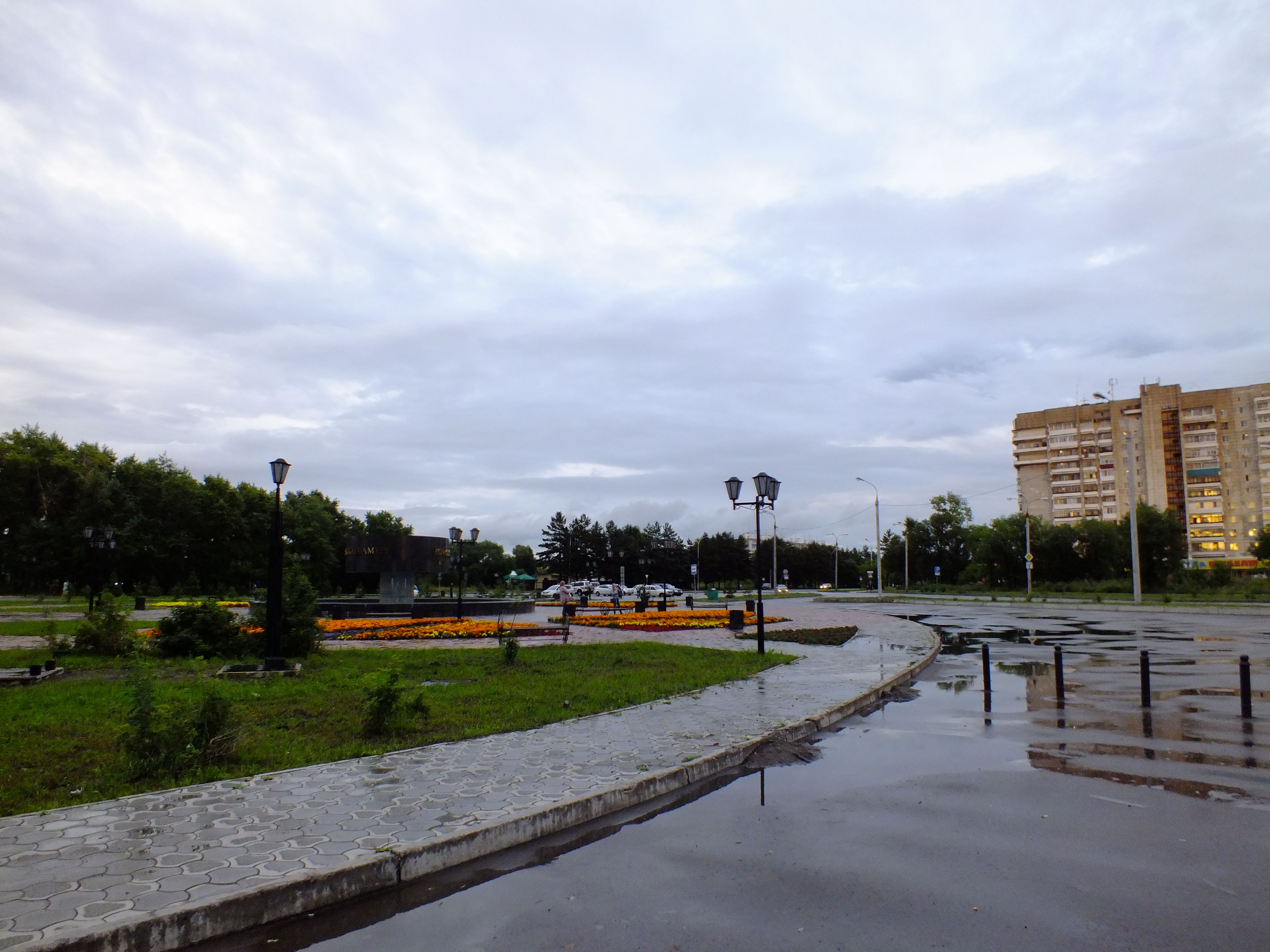 Komsomolsk-on-Amur